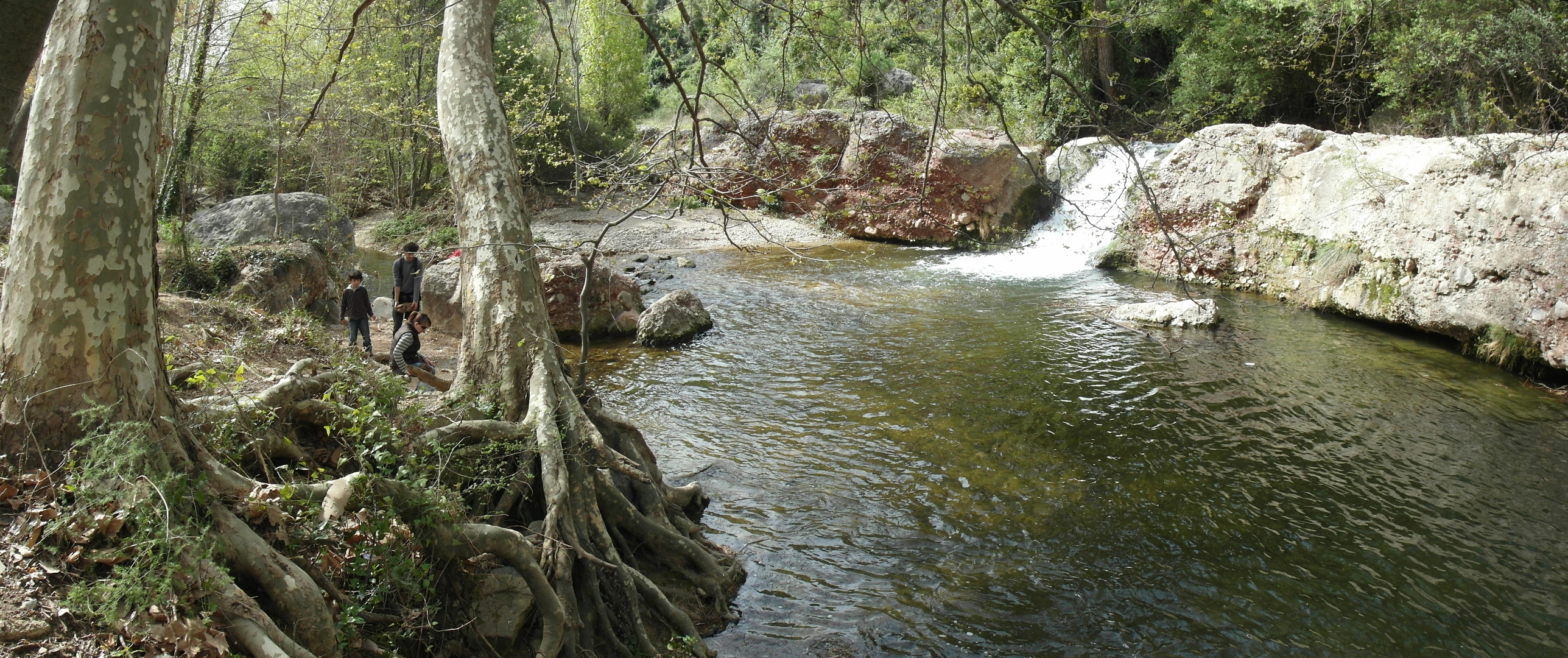 Riu Tenes - Gorg d'en Jeroni - Vall de Sant Miquel del Fai (1)